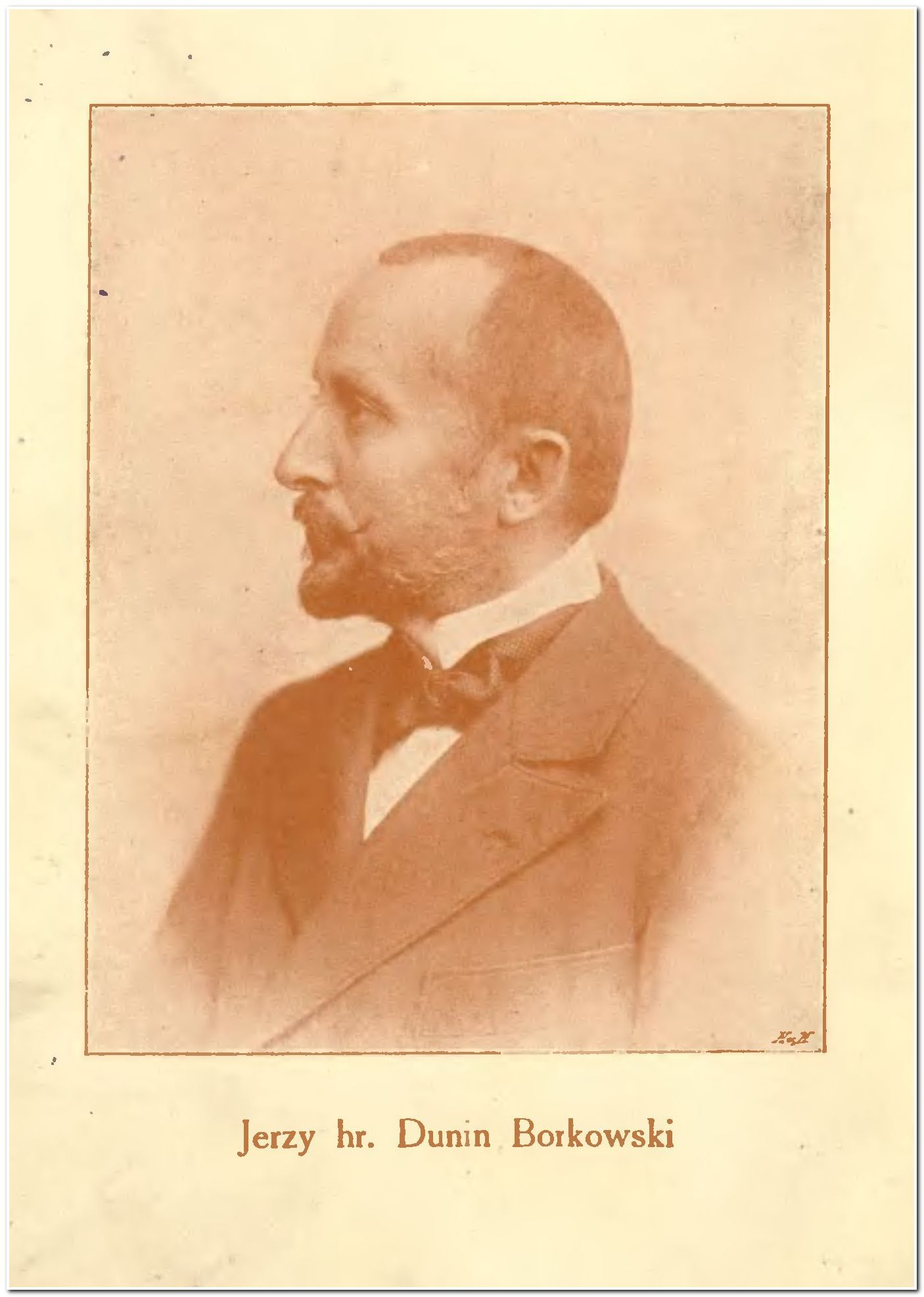 Fotografia z herbarza :Almanach błękitny : genealogia żyjących rodów polskich J.S. Dunina-Borkowskiego